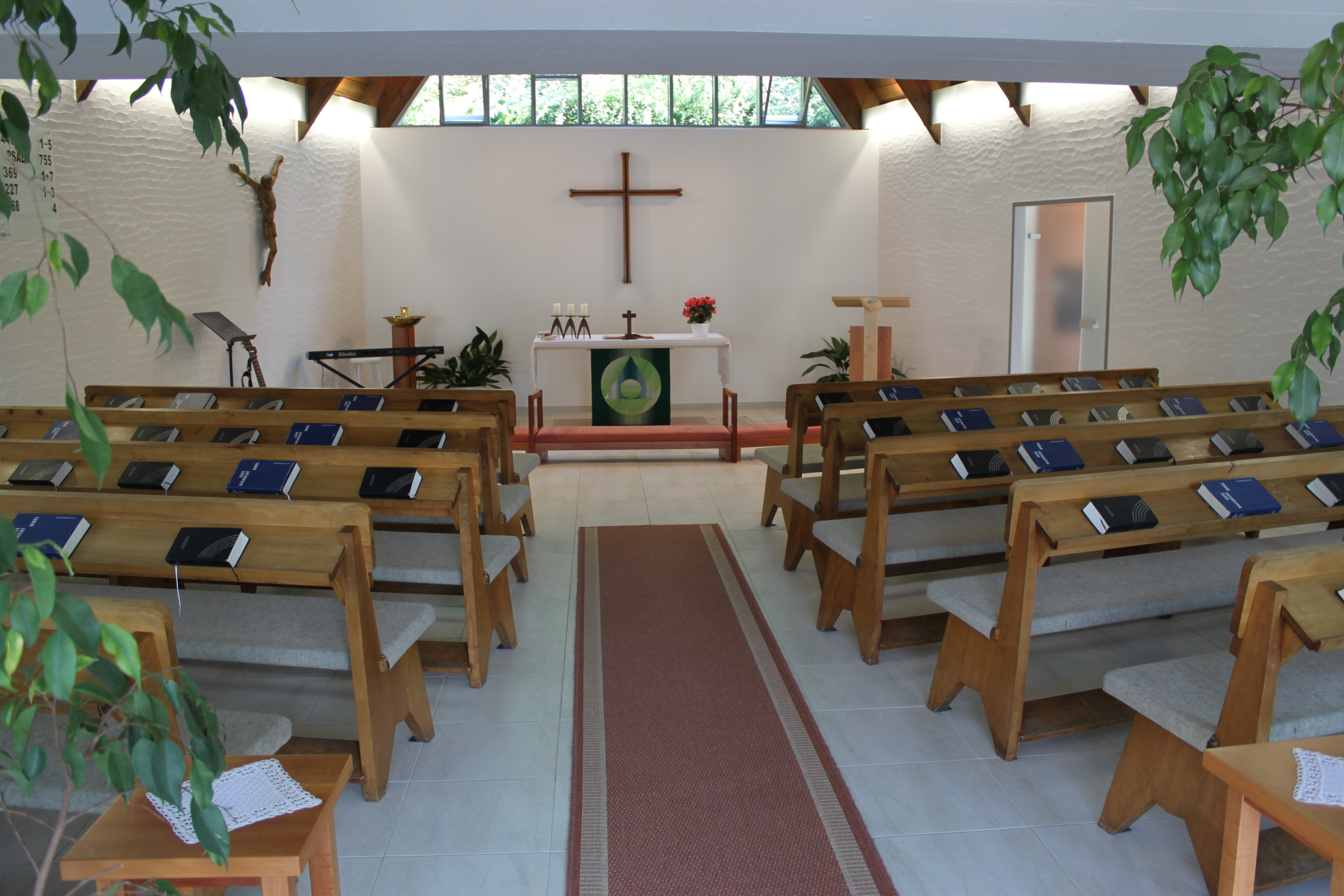 Innenraum der Trinitatiskirche in Hütteldorf (Wien-Penzing)